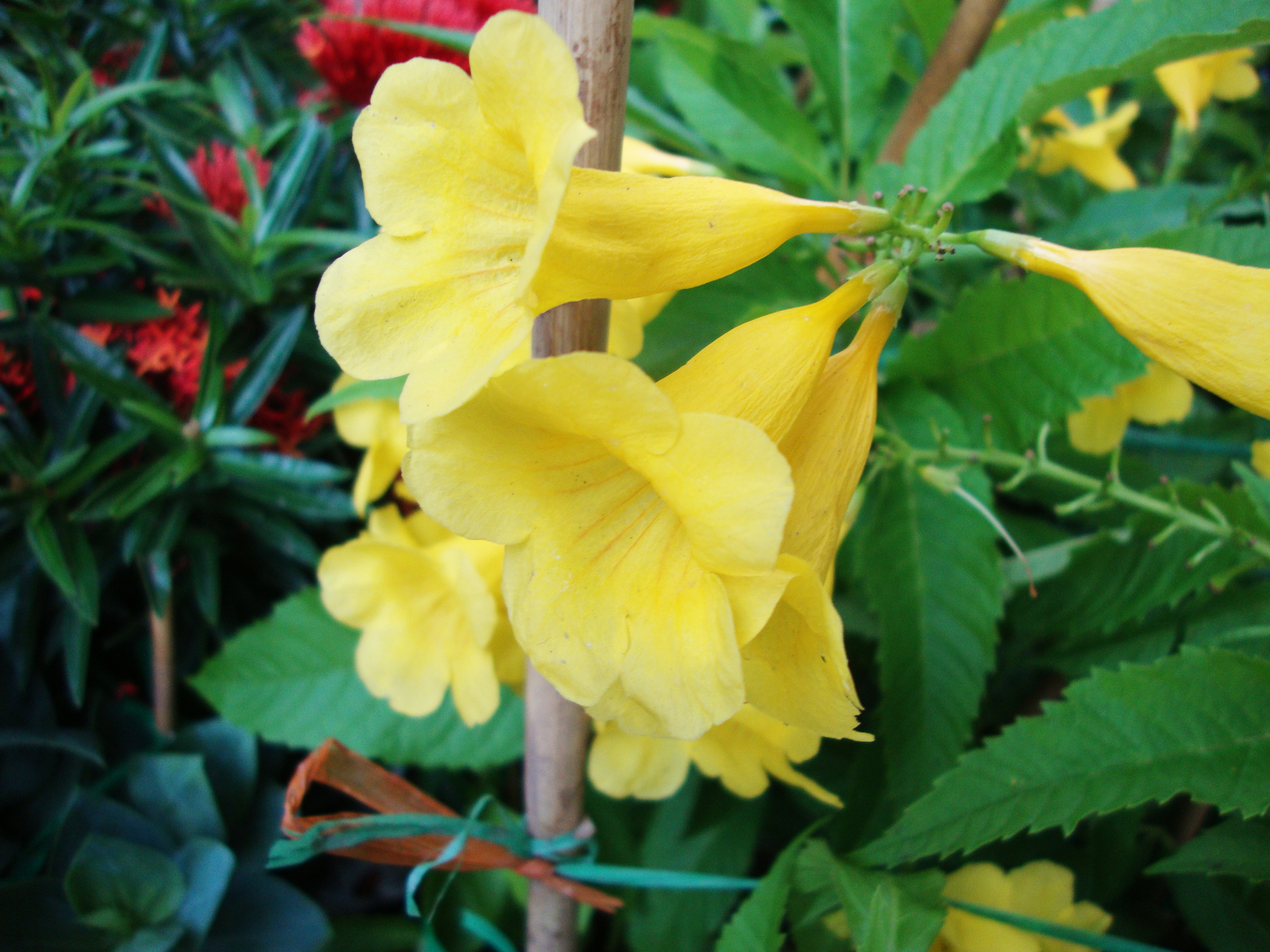 Tecoma stans (L.) Juss. ex Kunth, 1819Tiếng Việt: Huỳnh liên